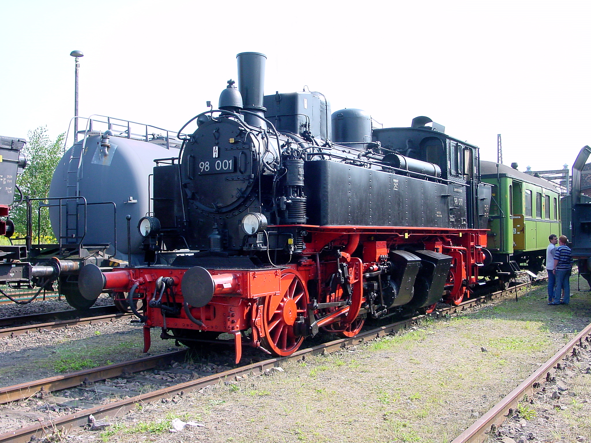 Dampflokomotive der Baureihe 98 im Eisenbahnmuseum Chemnitz-Hilbersdorf.